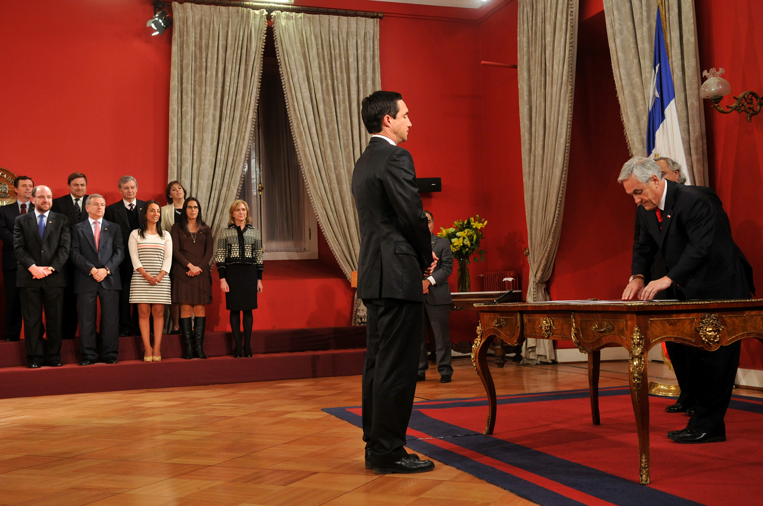 Juan Carlos Jobet asume como ministro del Trabajo.